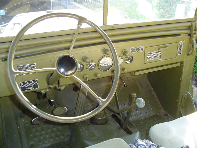 Tableau_de_bord_WC51_2